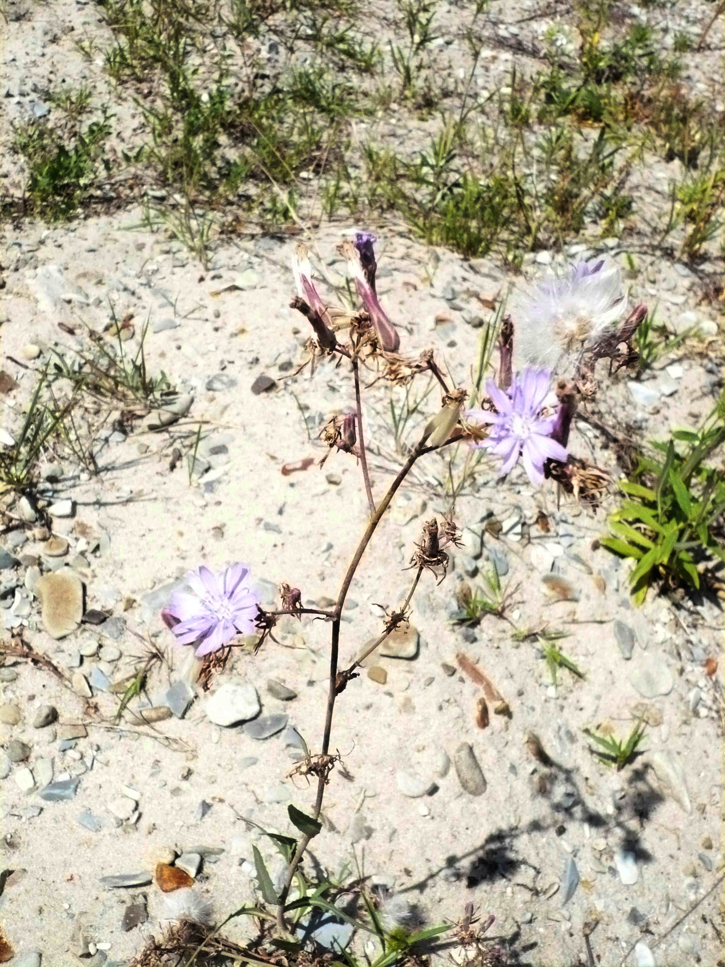 Латук татарский (Молокан татарский, Голубой осот). Окрестности Пензы, Россия